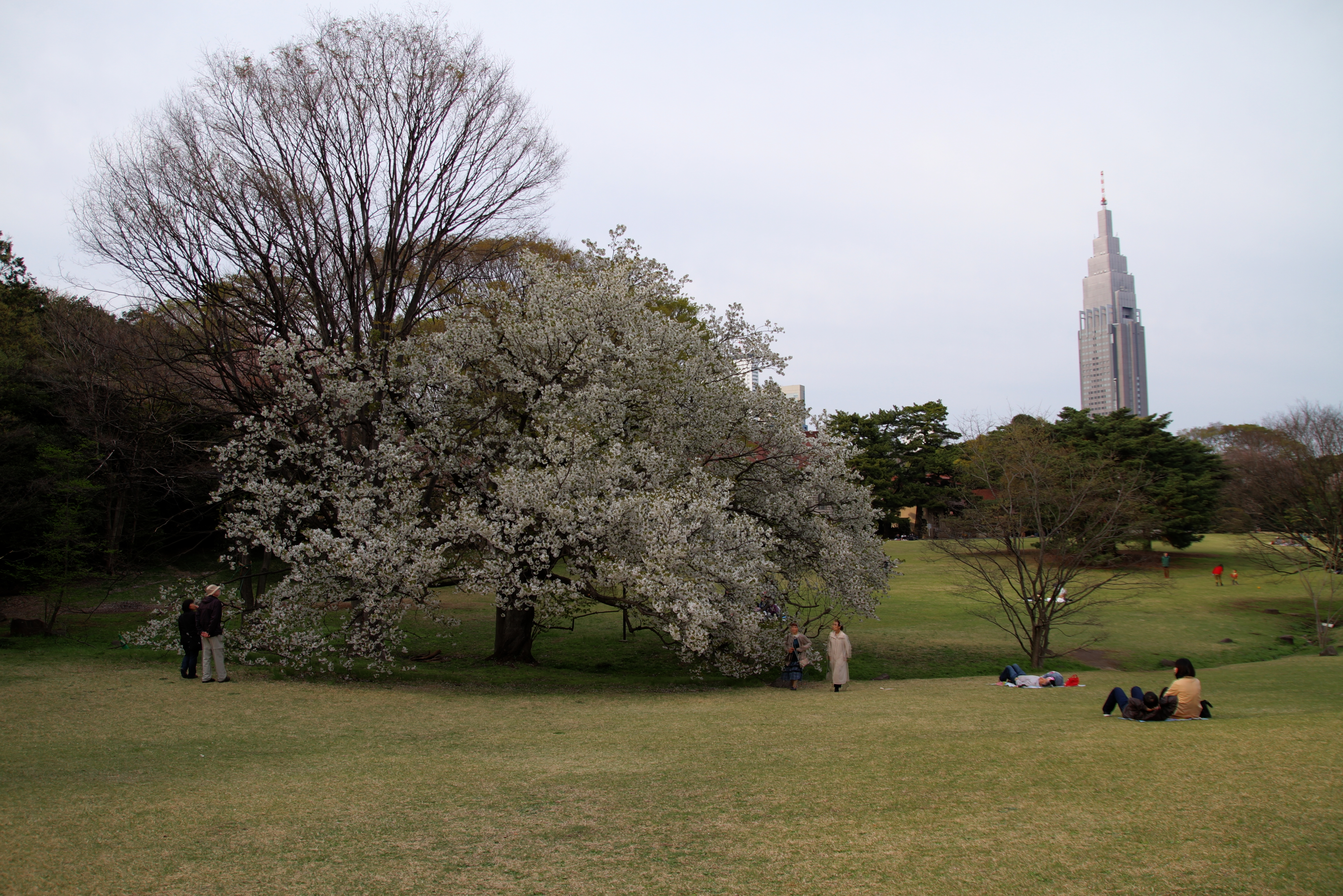 1 Yoyogikamizonochō, Shibuya-ku, Tōkyō-to 151-0052, Japan